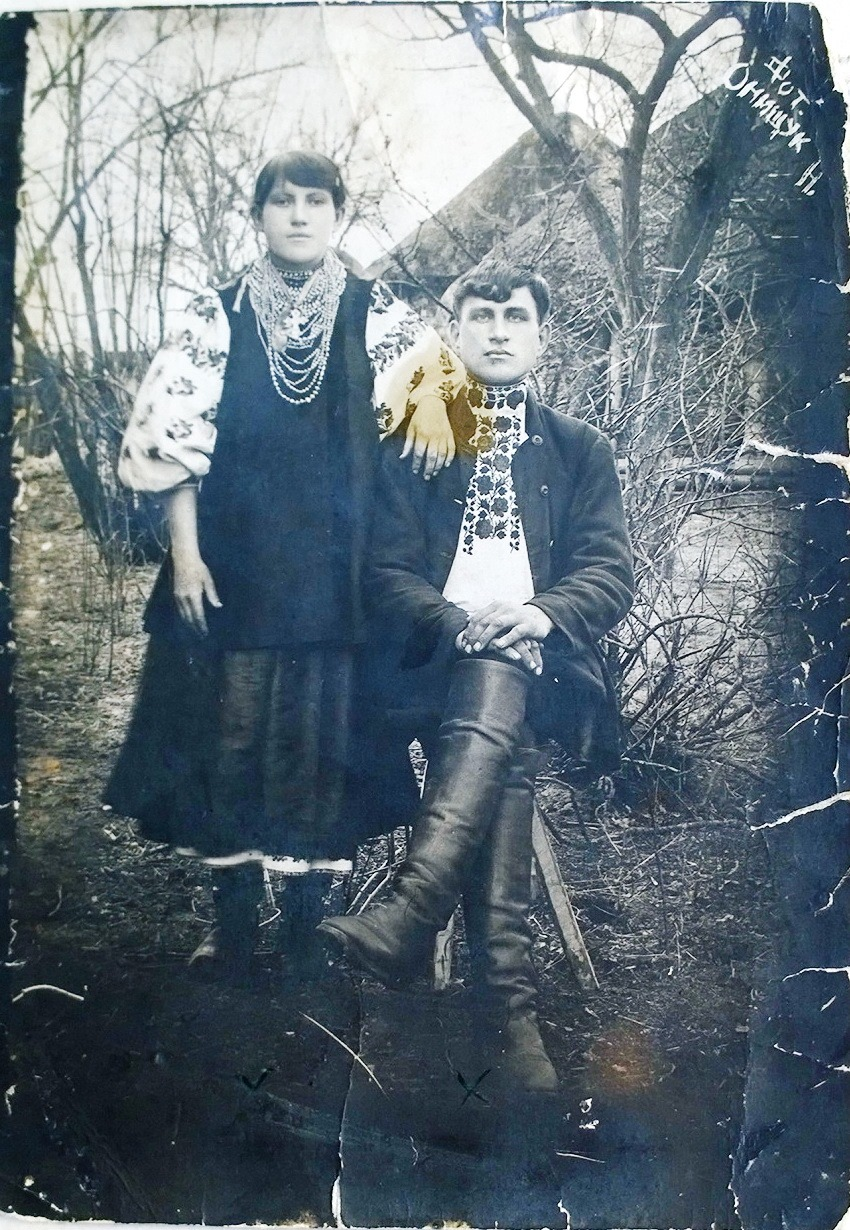 Весільне фото Григорія Івановича Байди та Ірини Петрівни (дівоче прізвище Доліч) — батьки Фурси Надії Григорівни (дівоче — Байда) та дід з бабою Фурси Валерія Михайловича. Фотографував відомий тогочасний фотограф Онищук. Мрин, 1925